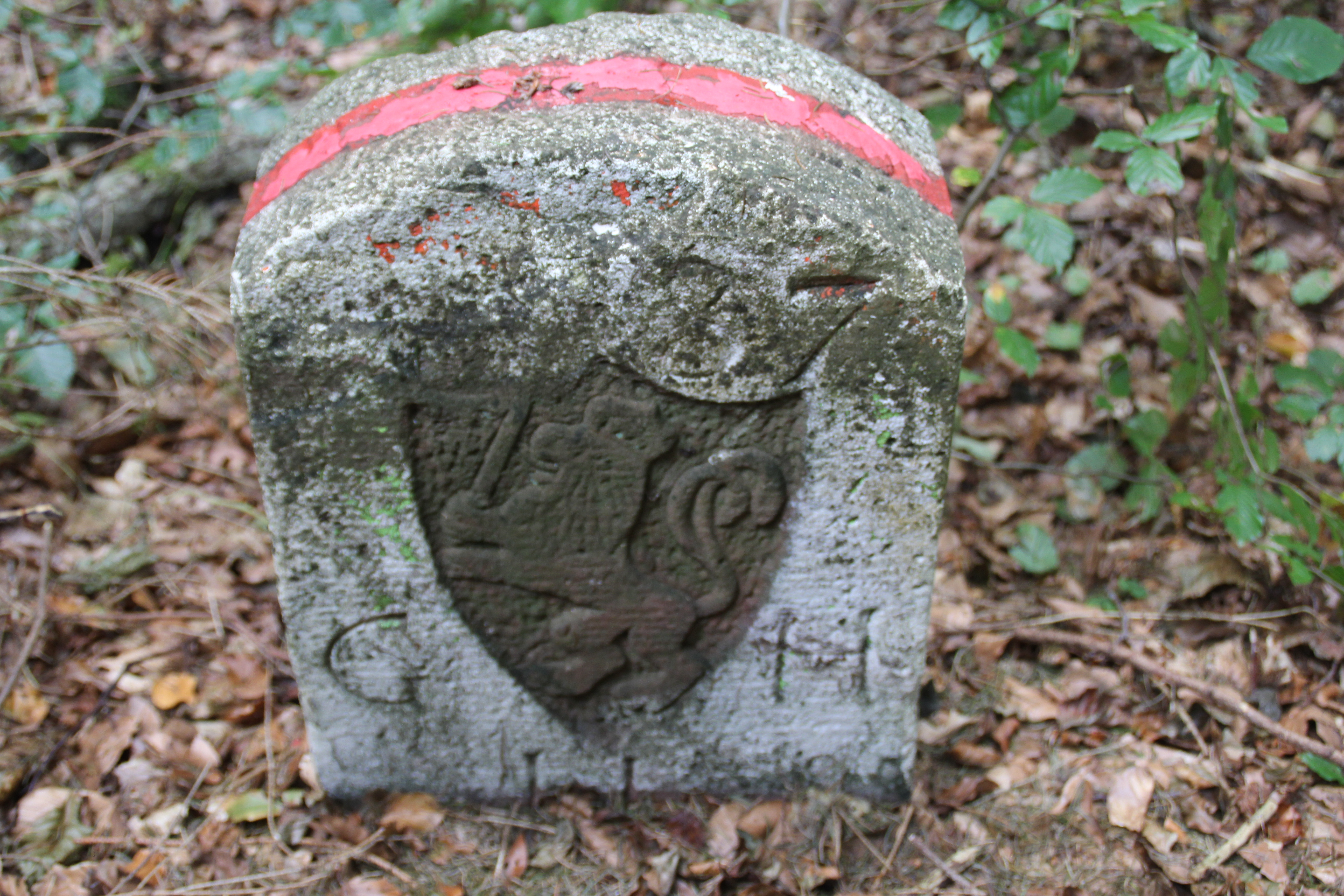 Grenzstein 90 zwischen Hörstein und Rückersbach